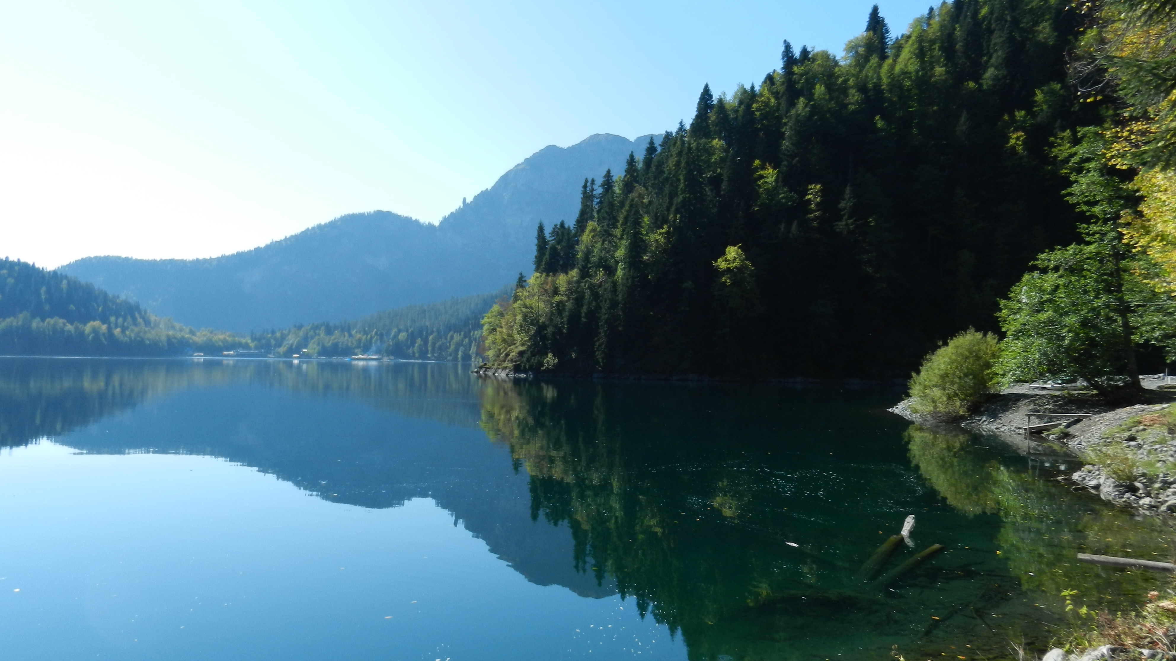 чистейшая вода